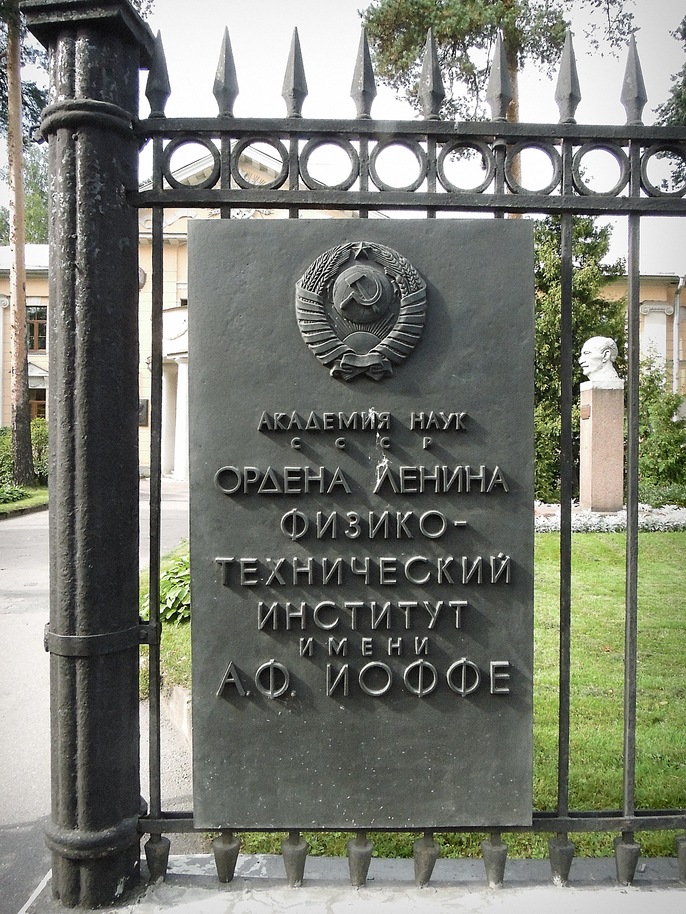 Ограда: Политехническая улица, 26, Гомельская улица, Выборгский район, Санкт-Петербург